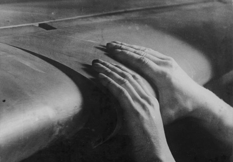 Das große Plus der Me 109 Die Technik steht nie still. Sie ist in ununterbrochener jäher Aufwärtsentwicklung begriffen - Dies gilt gegenwärtig insbesondere für die Rüstungsindustrie und den Flugzeugbau. Jede neue Type weist wieder Vorteile gegenüber den alten auf. Die Me 109 hat Spaltflügel, die die Flugeigenschaft dieser Type besonders begünstigen. PK.-Kriegsb. Höss